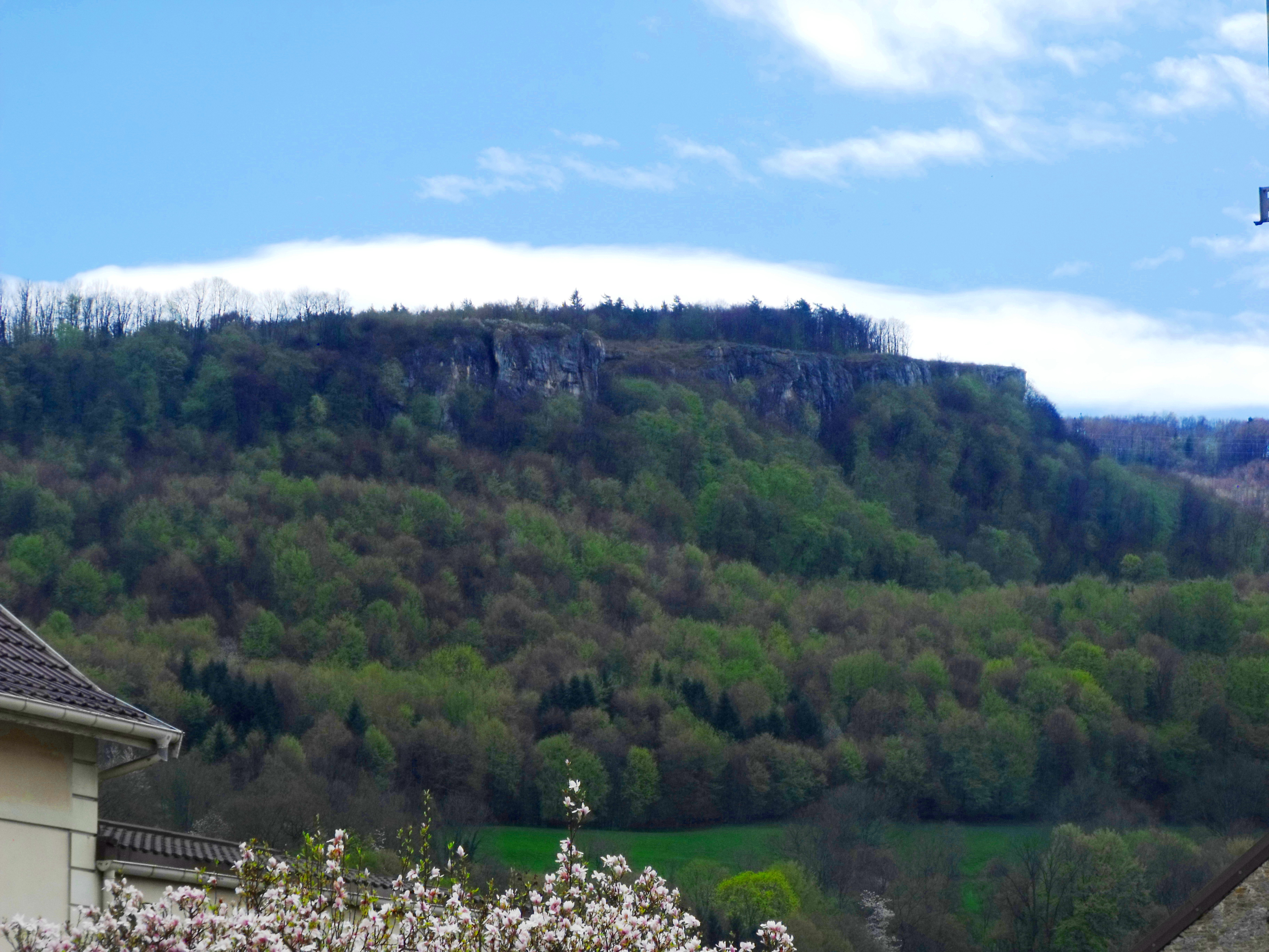 Corniche de la RNR153-Cret des roches depuis Pont de Roide, Doubs, France